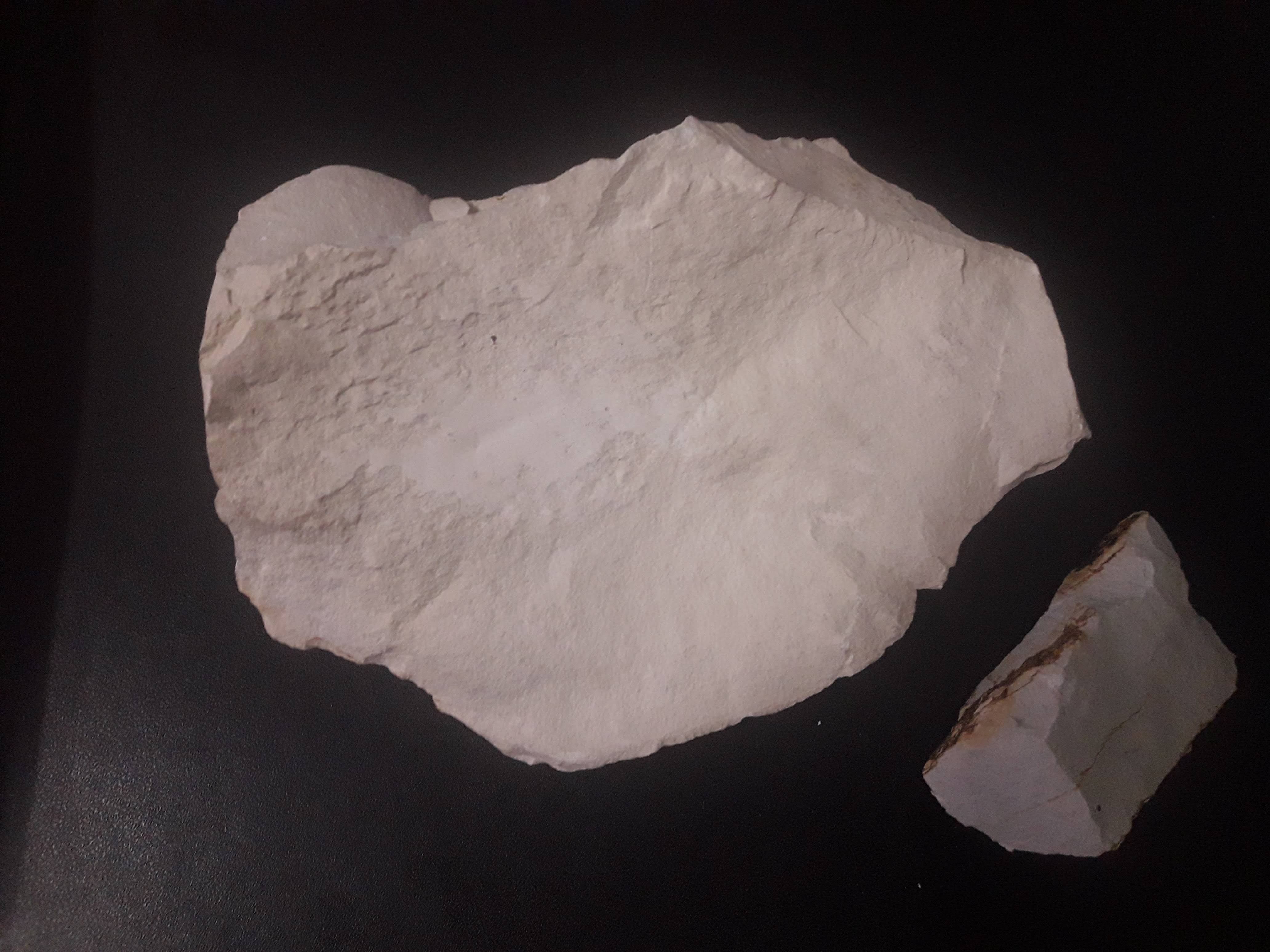 Zeolit